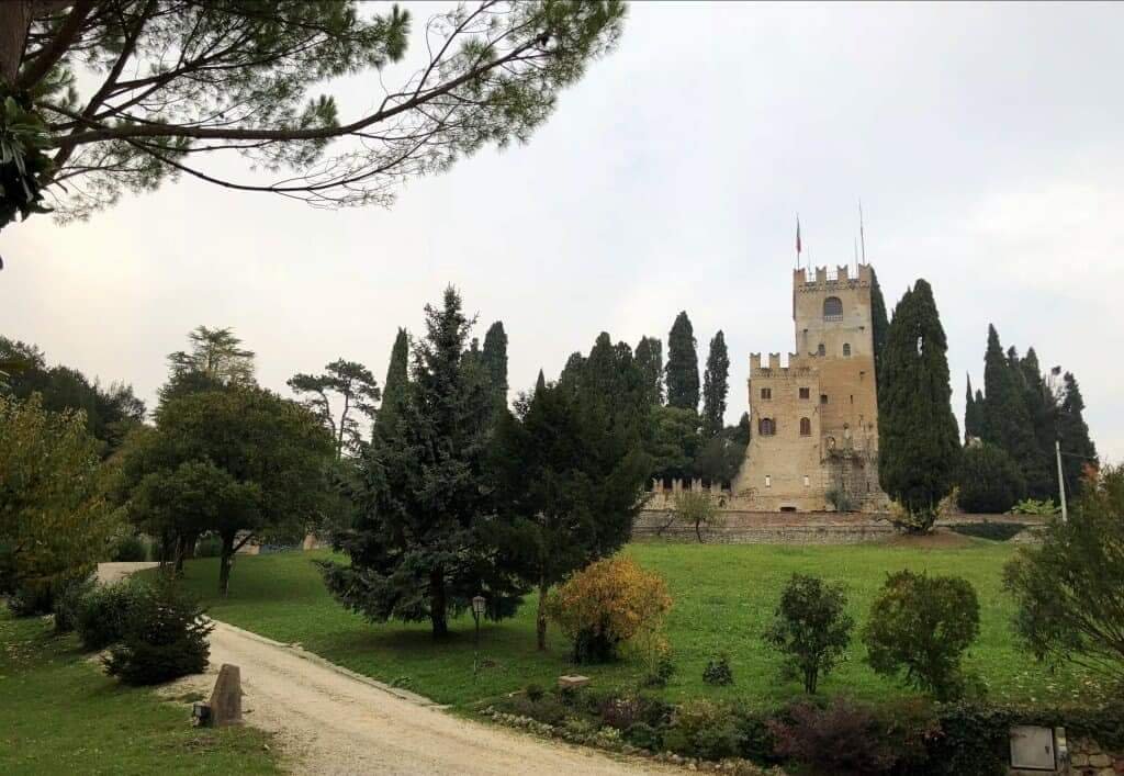 Il Maestoso e imponente Castello di Conegliano visto da Villa Gera. This is a photo of a monument which is part of cultural heritage of Italy.